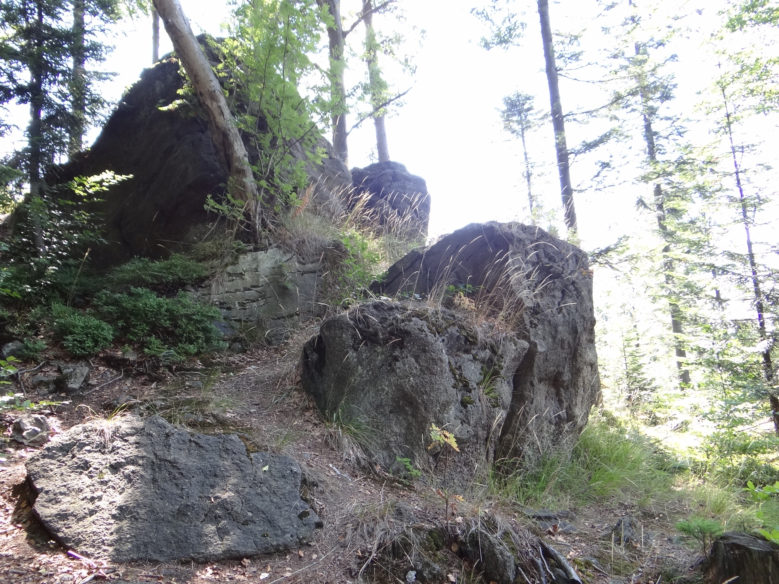 Skałki na Łamanej Skale